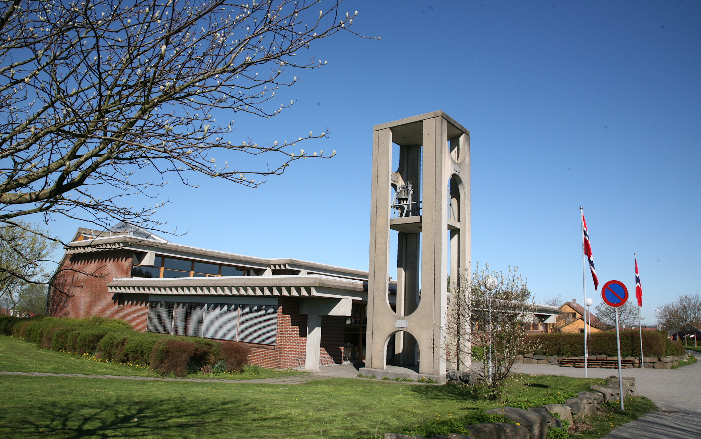 Sunde kirke